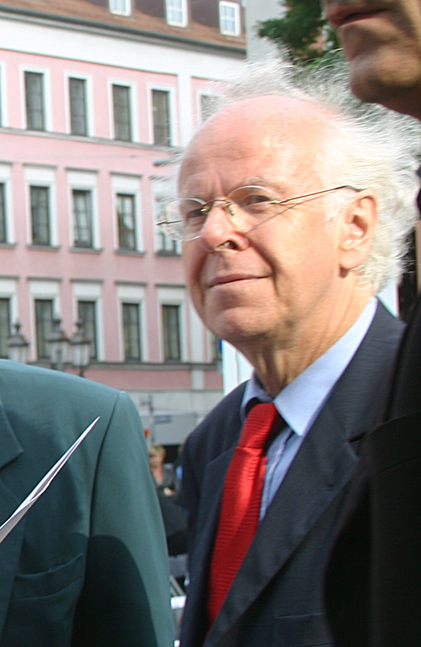 Klaus Schultz, war u.a. von 1996 bis 2007 Staatsintendant und Chefdramaturg des Staatstheaters am Gärtnerplatz.